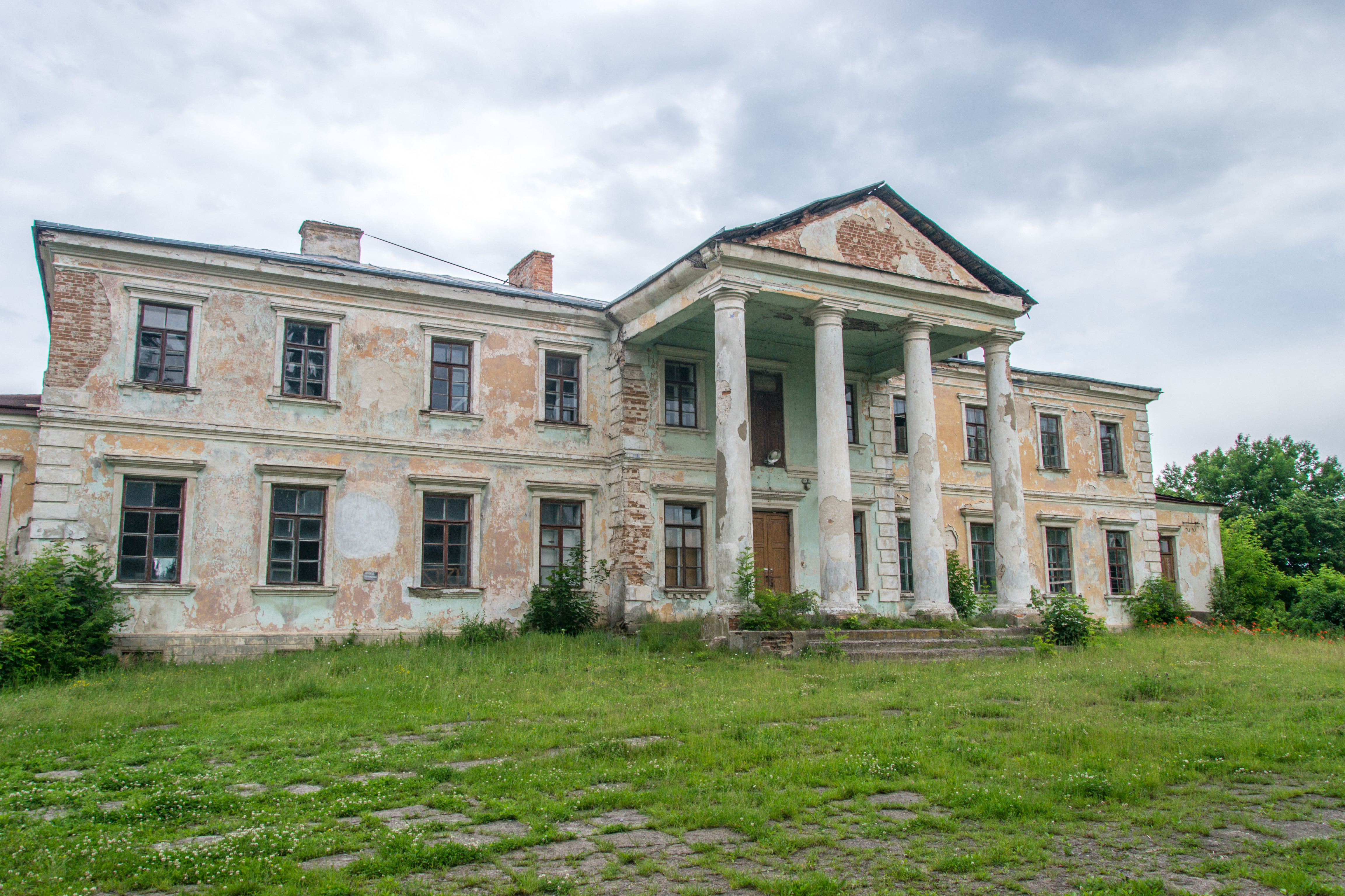 Палац, Гущинці, вул.Леніна,10